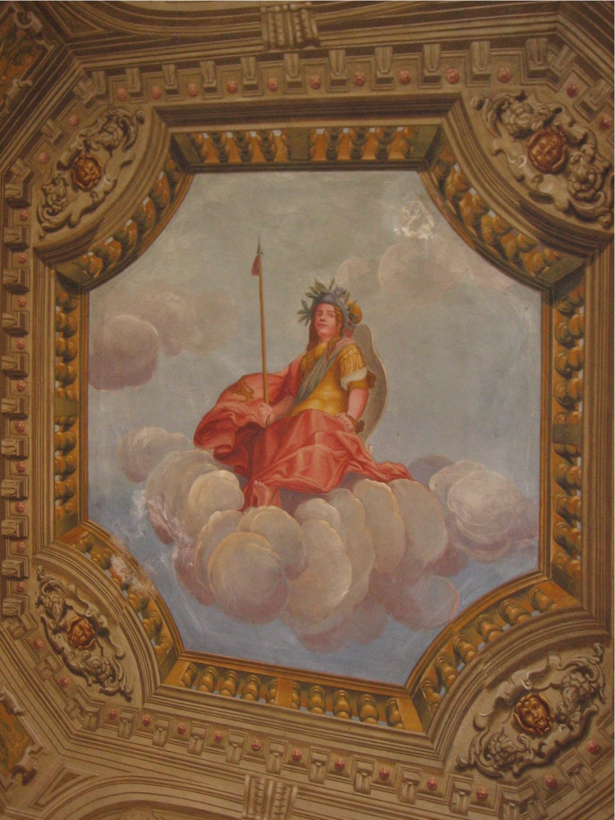 Palazzo Pelliccioli, Alzano Lombardo, BG